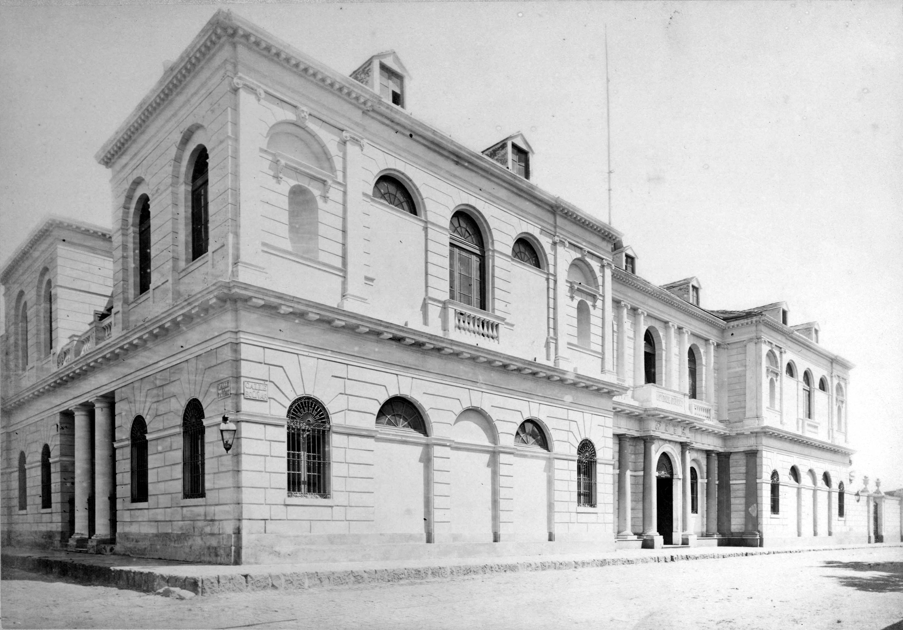 Front of the first Hospital Italiano building in Buenos Aires. The project by started by Arq. Pietro Fossati in 1854 and concluded by Arq. José Canale. The building was placed on the corner of Bolívar and Caseros streets and was opened to public on December 8, 1872. In 1901 the Hospital Italiano moved to its current building on Cangallo (current Presidente Perón) Street.